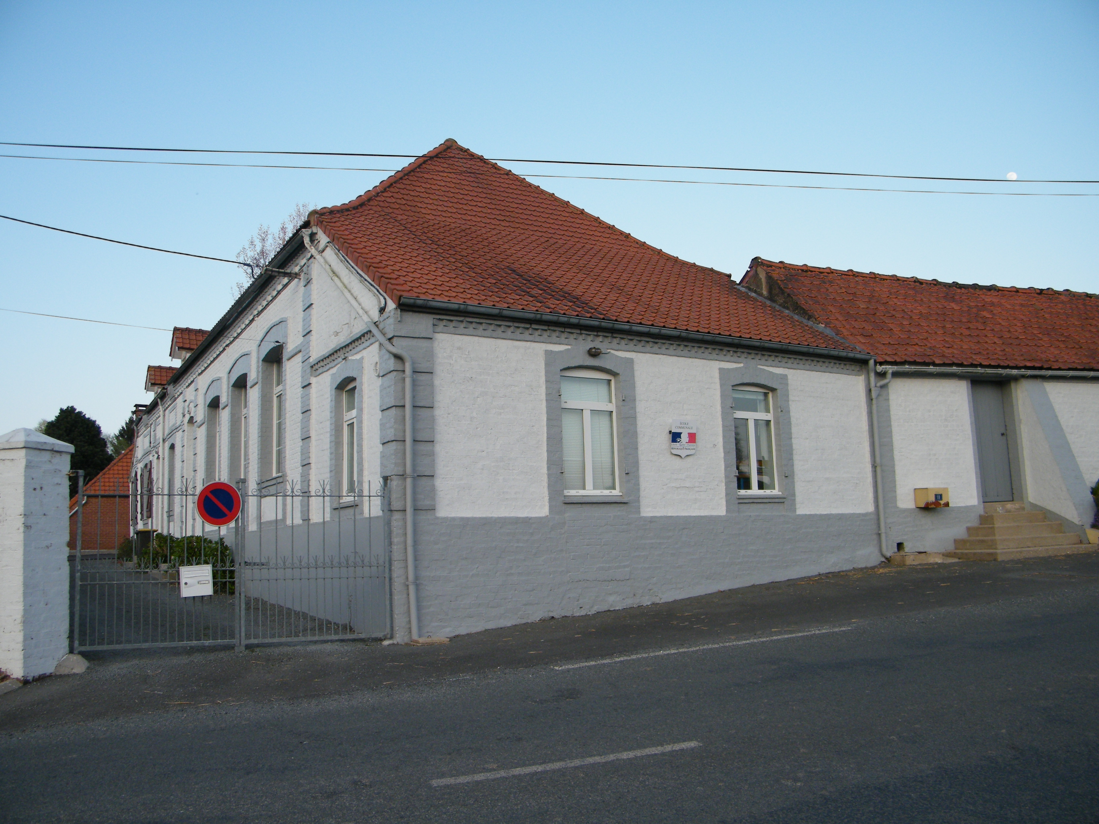 Bezinghem, Pas-de-Calais, Fr, école